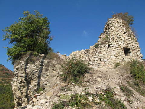 restes castell de Guardiola de Berguedà